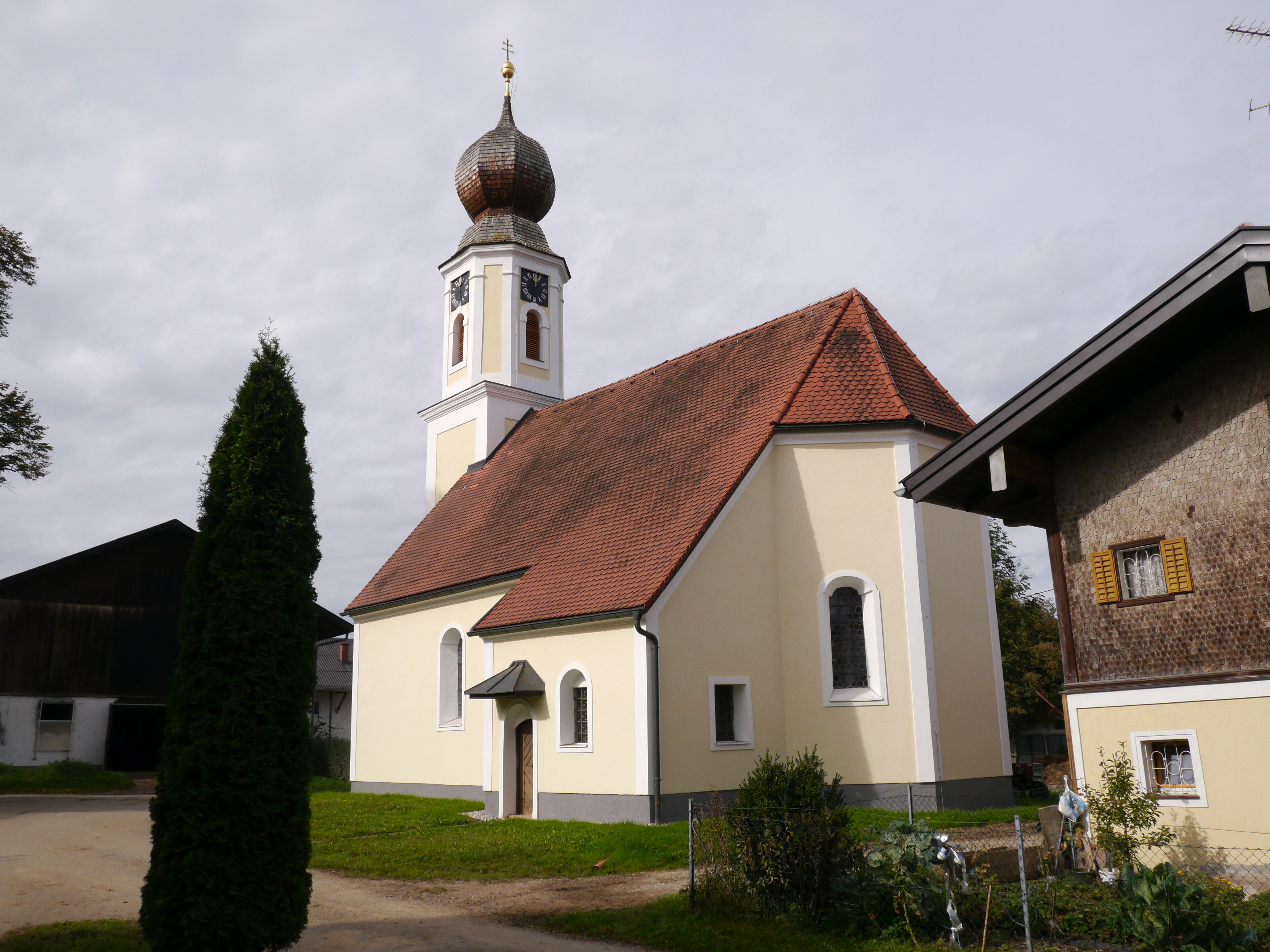 Kath. Filialkirche hl. Martin und ehem. Friedhof